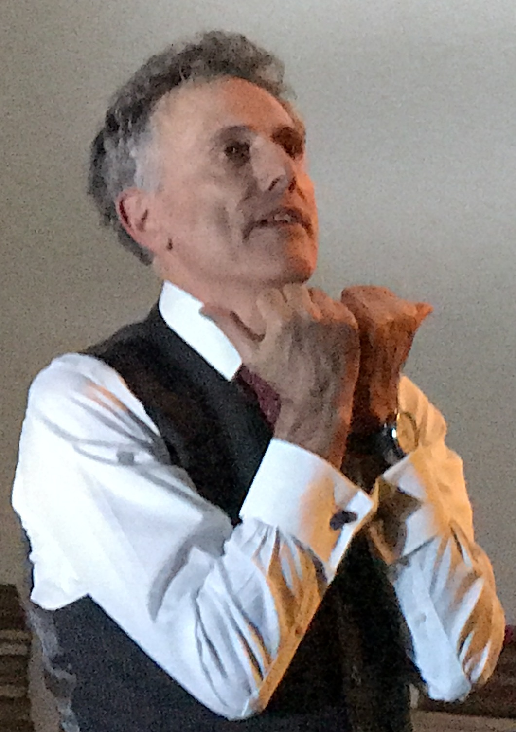 David Greenspan in 2017